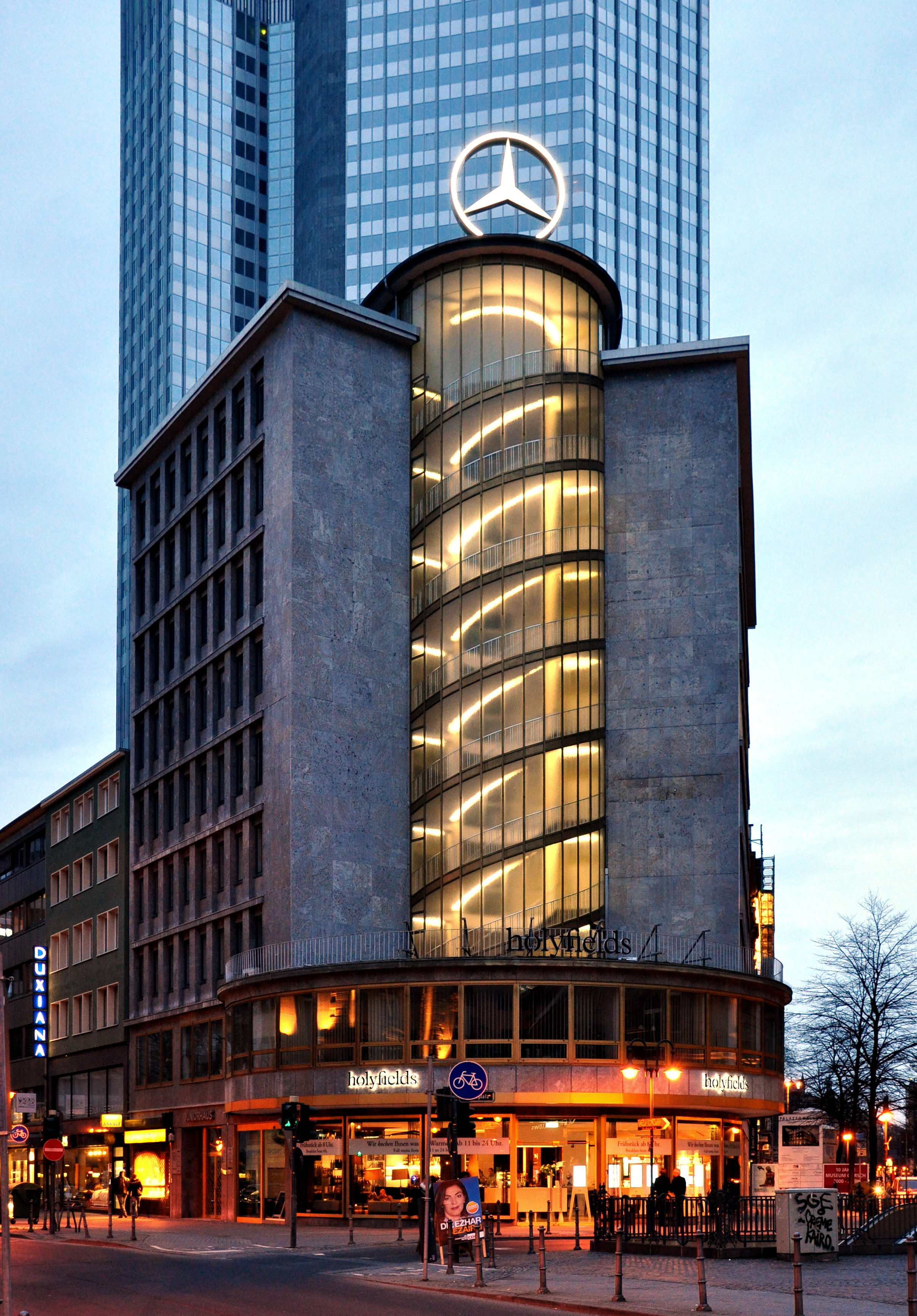 Junior-Haus am Kaiserplatz in Frankfurt am Main